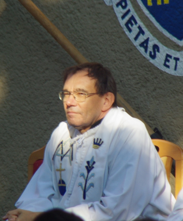 Mosonmagyaróvári Piarista Iskola és Gimnázium évzáróján, 2008